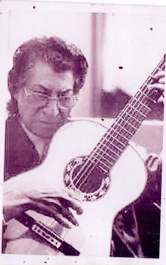 JUAN SANTIAGO MAYA, guitarrista gitano, más conocido en el mundo de la guitarra flamenca con el nombre artístico de MAROTE, nació en Granada en el año de 1936, y murió en Granada en septiembre del año 2002. Hermano de Manolete y Pepe Maya.